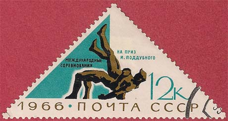 Марка СССР, посвящённая турниру по борьбе на призы И. Поддубного из серии "Международные спортивные соревнования в СССР". На треугольной марке изображены борцы. Рисунок Е. Анискина. Тираж - 4 млн. Печать глубокая. Рамочная зубцовка 11/2. Номинал 12 коп. Номер - 3372 (ЦФА)